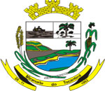 Brasão de armas do município de Miranorte, Tocantins, Brasil.